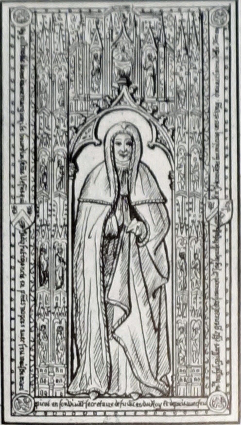 corrigé d'un relevé fait pour Gaignières, BNF numérisation Gallica.